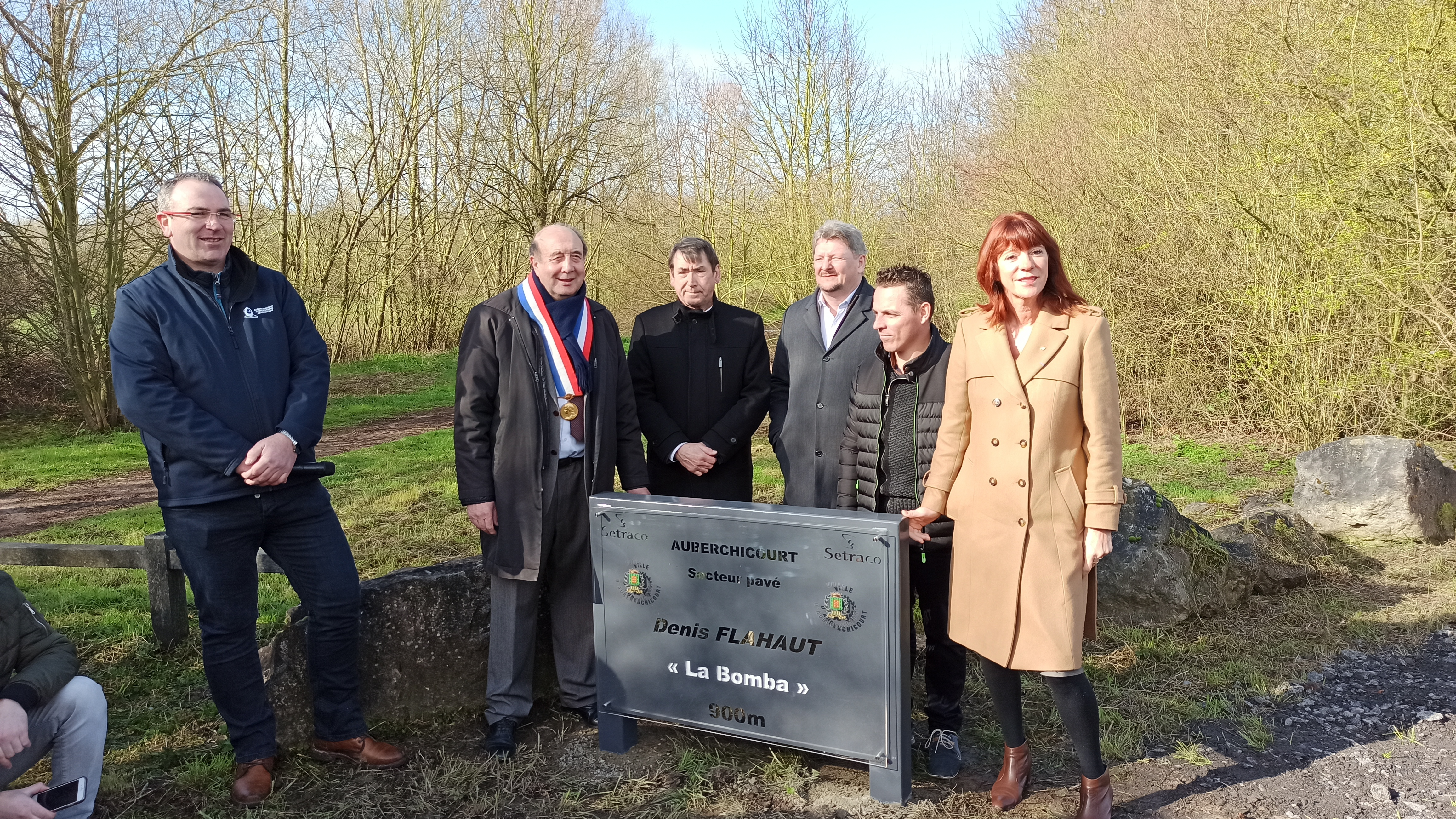 Inauguration le 14 mars 2020 du secteur pavé Denis Flahaut, dévoilement de la stéle